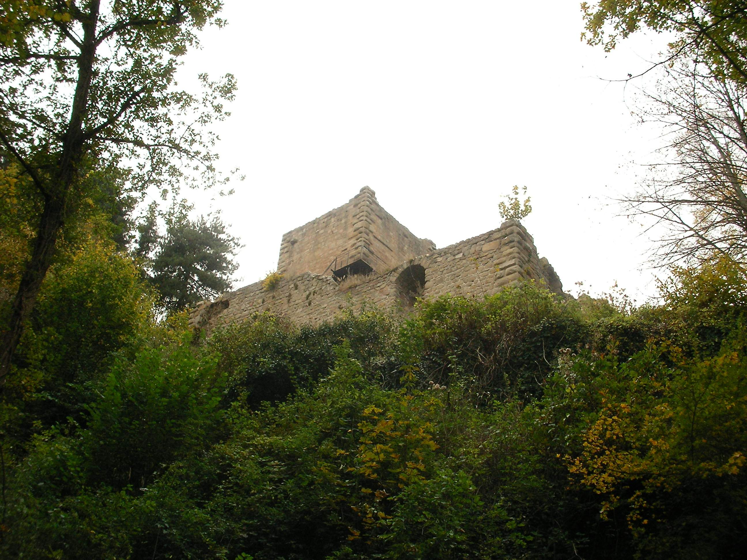 Château du Hagueneck (450 m) à Wettolsheim (Haut-Rhin, France).